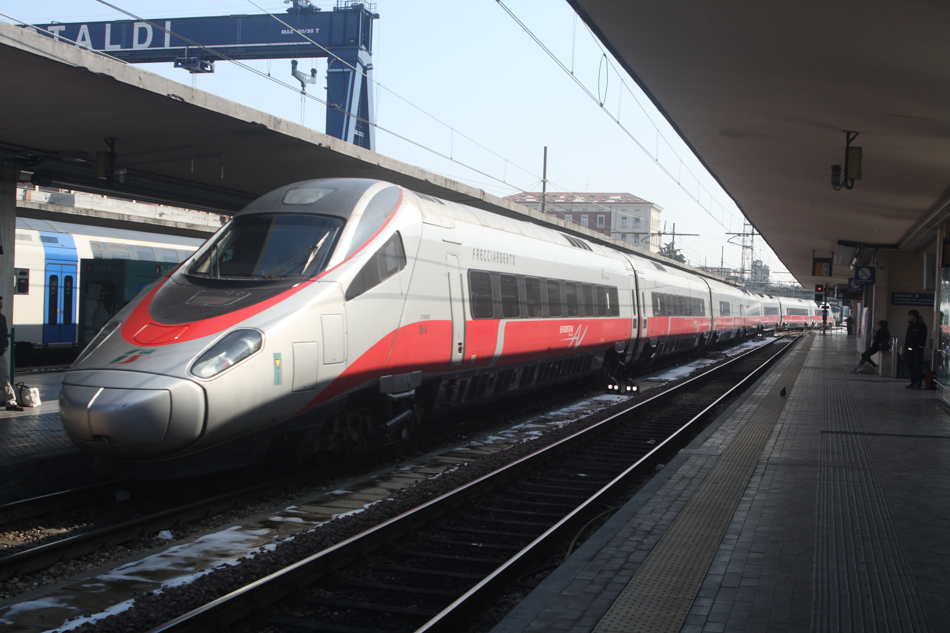 etr 600 pendolino frecciargento.jpg